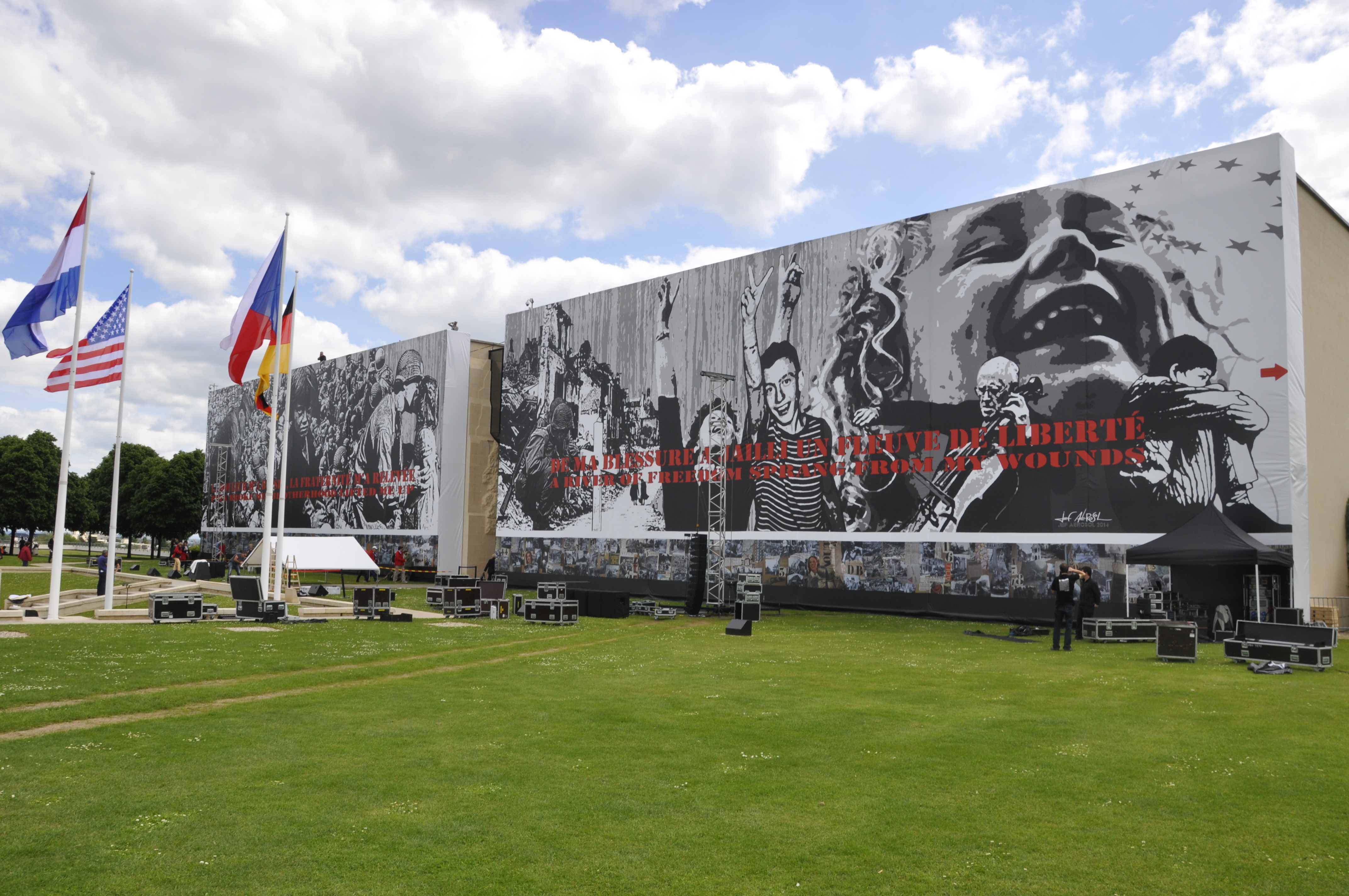 La façade du Mémorial de Caen, le 5 juin 2014 avec la fresque de Jeff Aéro.